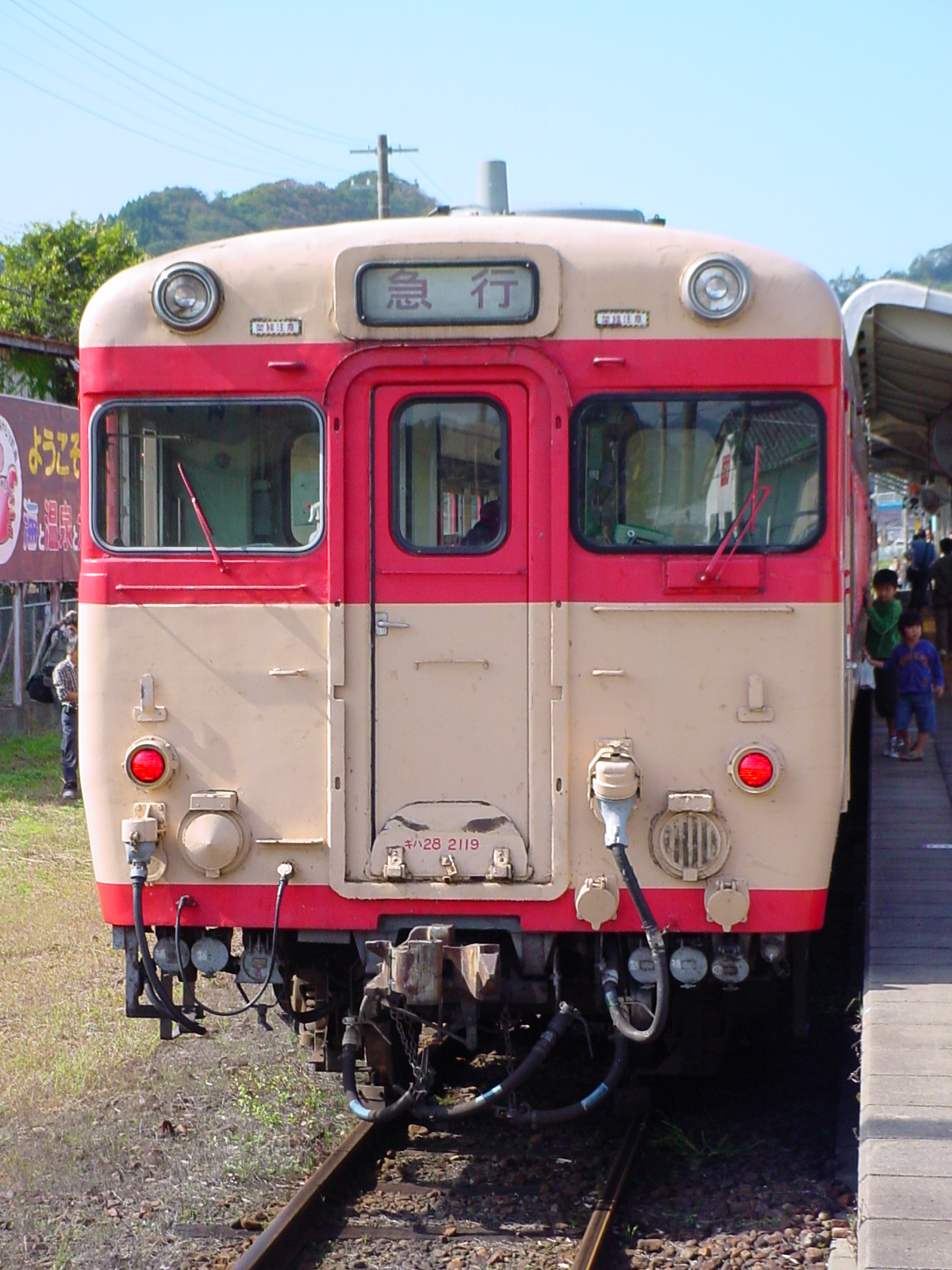 2006年10月21日 投稿者が撮影 臨時急行あまるべja:山陰本線ja:浜坂駅にて